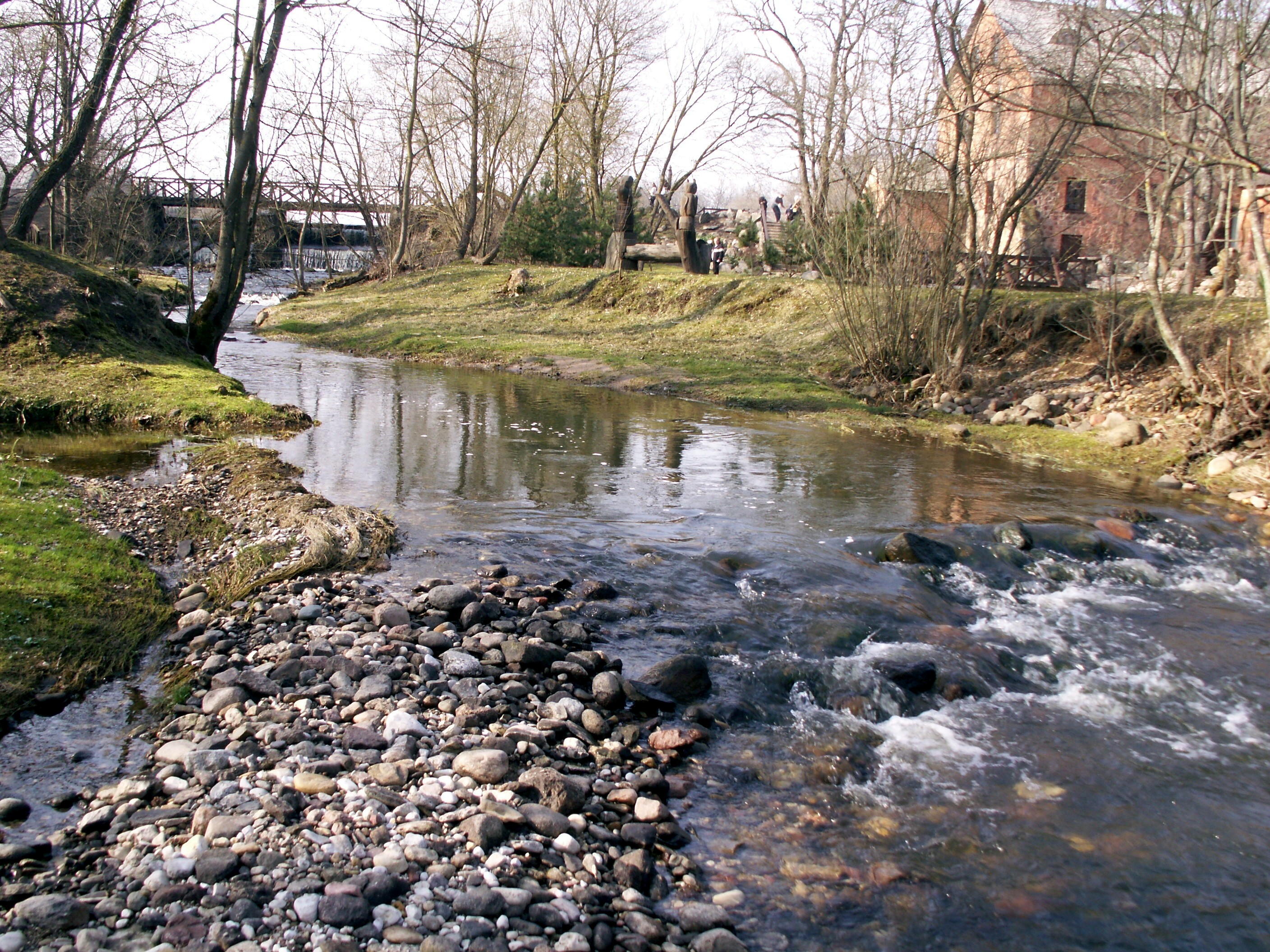 Venta river at Užventis